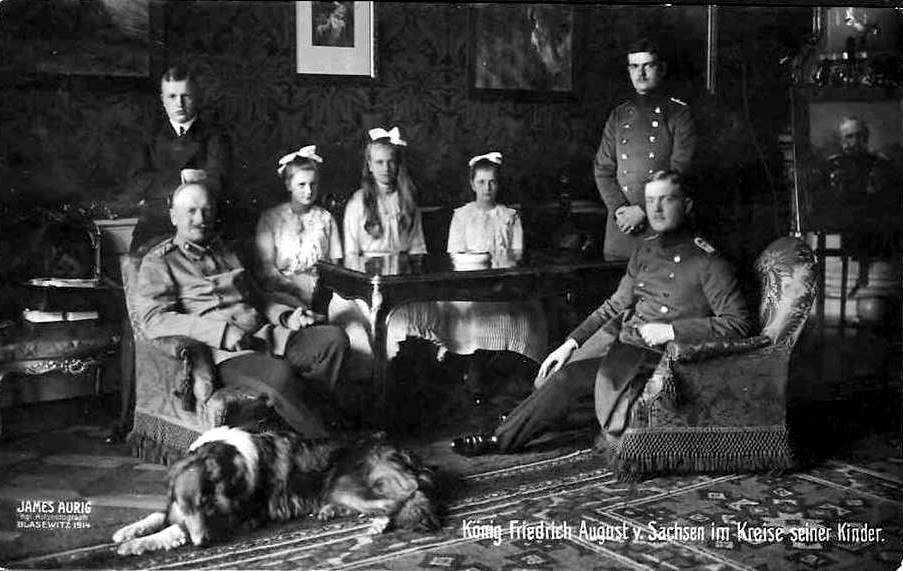 Seine königliche Hoheit Friedrich August III. von Sachsen.